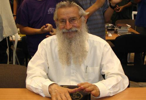 הרב זלמן מלמד בנוה דקלים רישיון נוצר על ידי משתמש:Temany